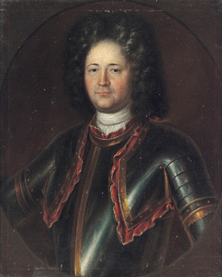 Johann Heinrich von Hirschligau - Hörselgau aus sächsischem Geschlecht, kam in den Dienst des Markgrafen von Brandenburg Ansbach. Er wird Oberstallmeister, Falknermeister und 1709 ist er Oberst und Amtmann zu Feuchtwangen, 1723 Generalmajor und Kommandant der Festung Wülzdorf bei Weißenburg. Er kauft von den Herren von Stetten den Hof zu Gahrenberg .